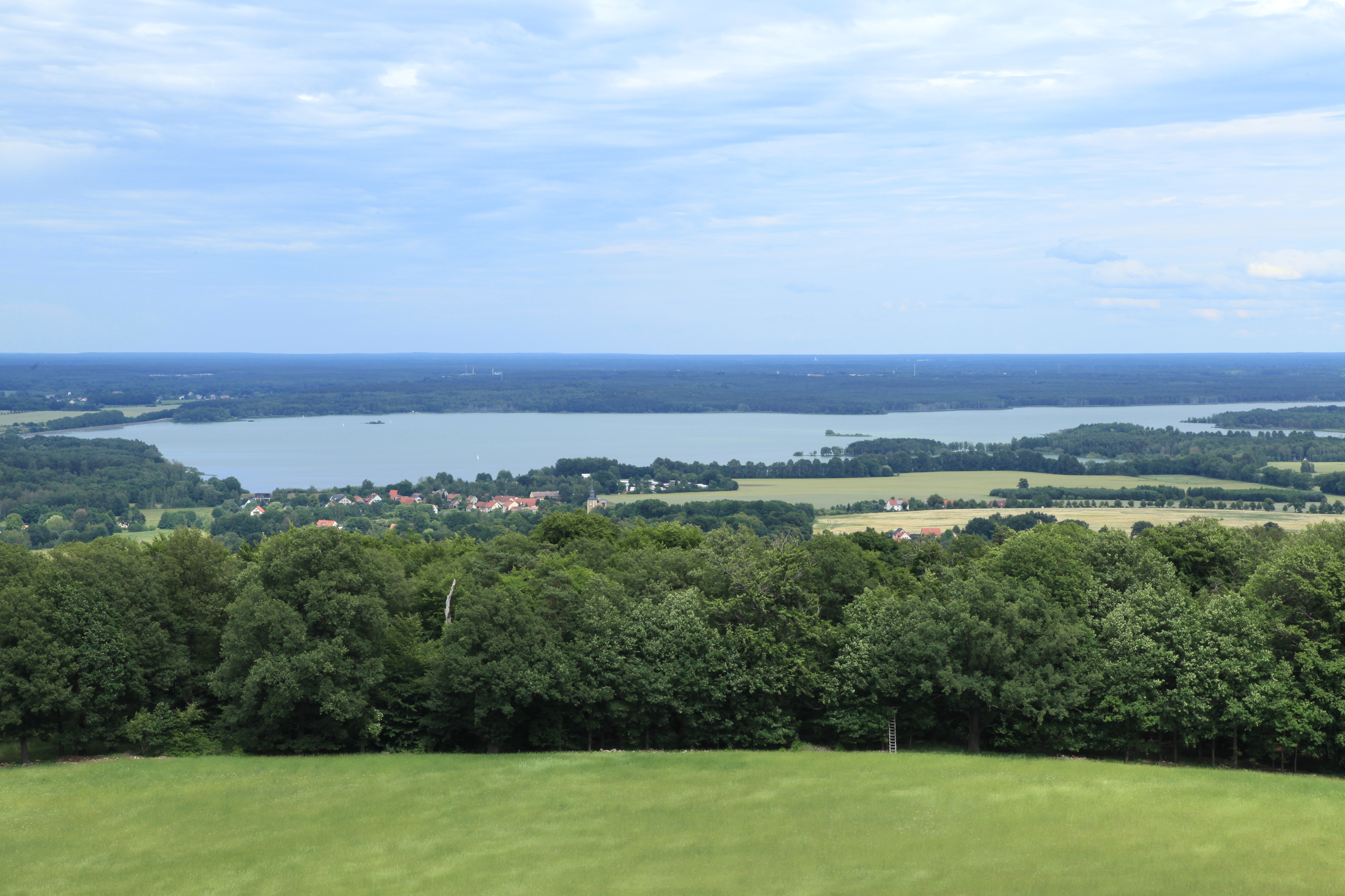 Blick vom Aussichtsturm auf dem Monumentberg in Groß Radisch, Hohendubrau, zu Kollm in Quitzdorf am See vor der Talsperre Quitzdorf